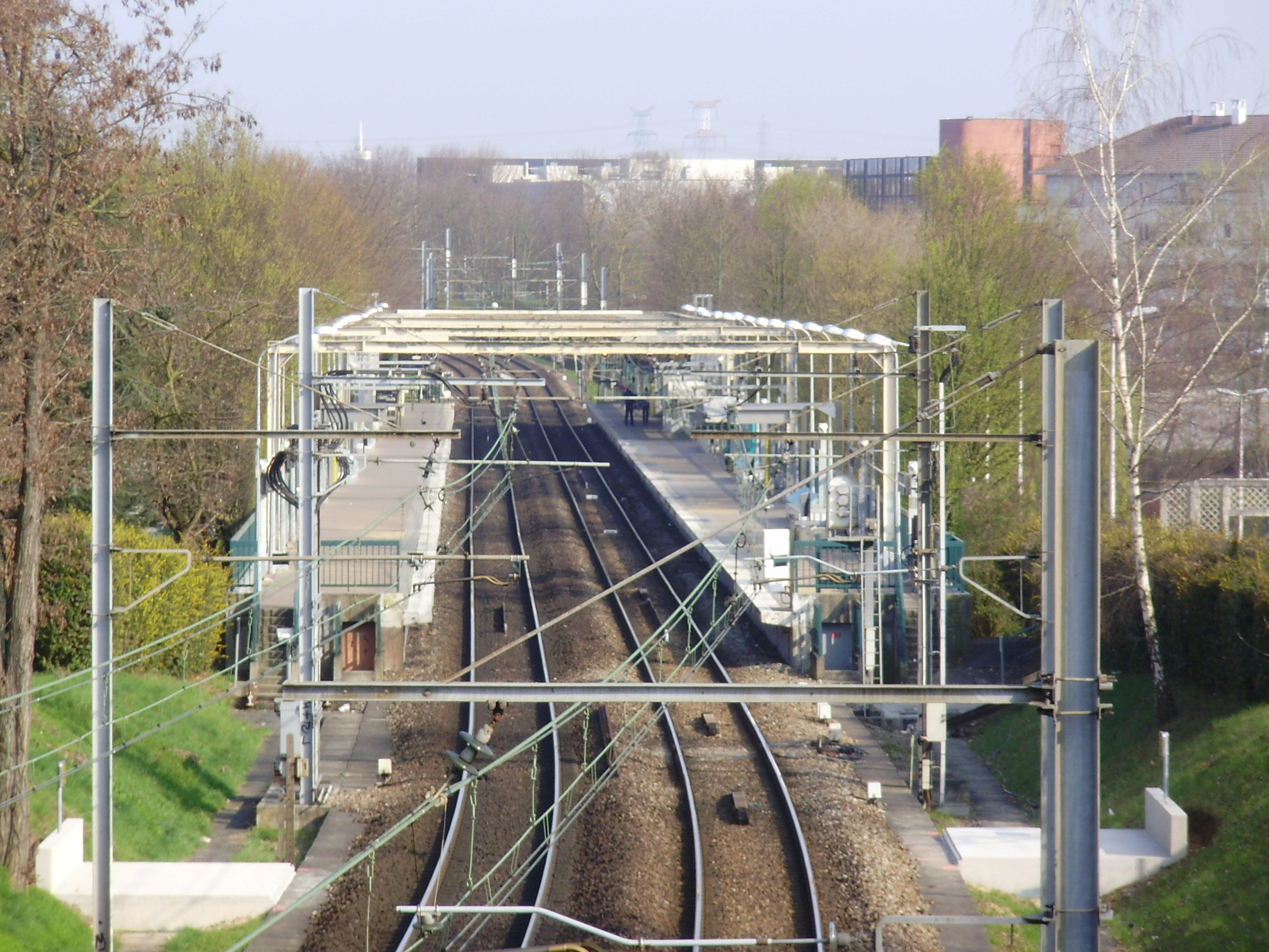 Gare de Lognes, Seine-et-Marne, France : vue des quais depuis le pont du boulevard de la Malvoisine, à l'ouest de la gare